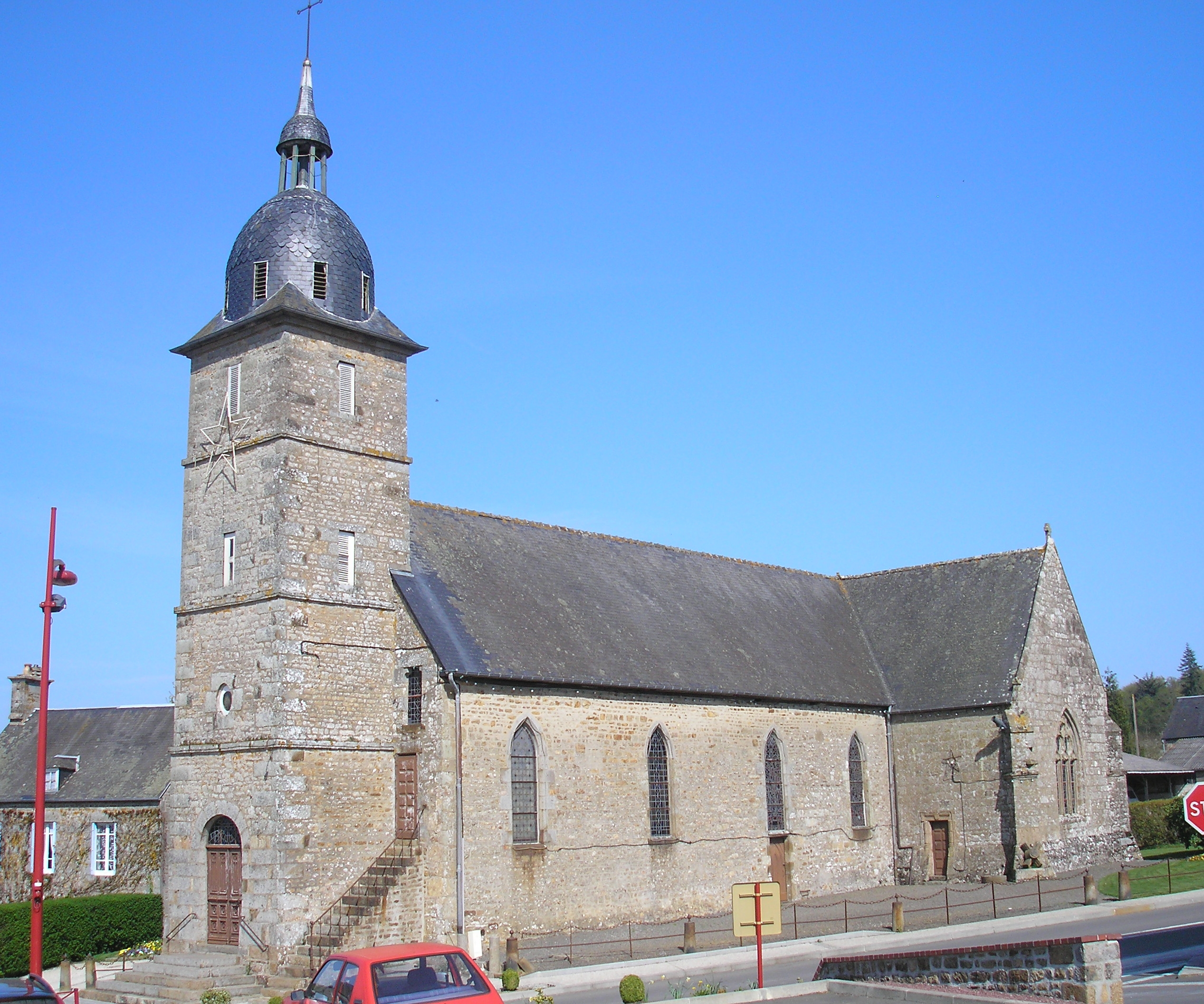 Sainte-Honorine-la-Chardonne (Normandie, France). L'église Sainte-Honorine.